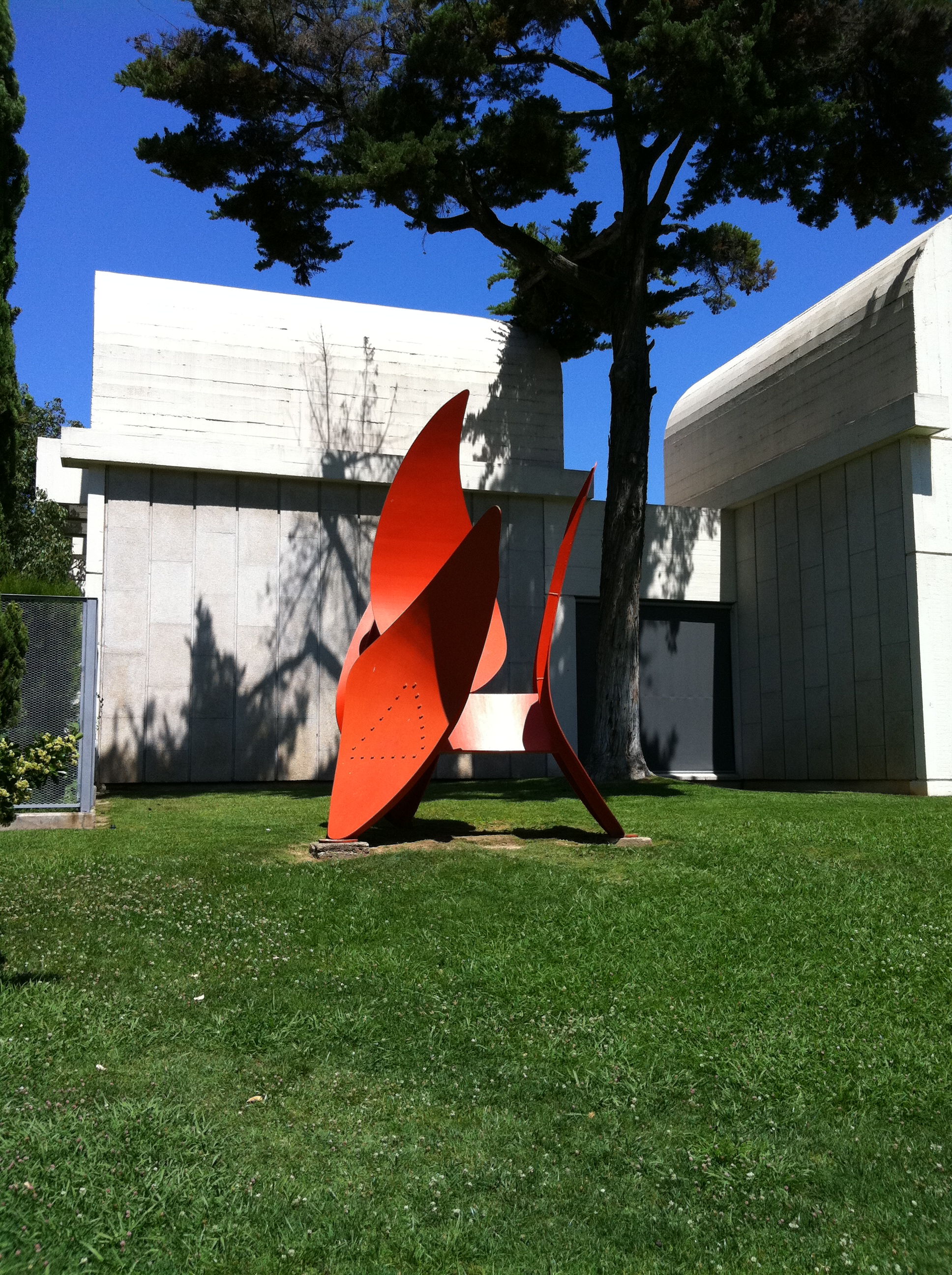 Fundació Joan Miró exterior views Alexander Calder - 4 wings- 1972